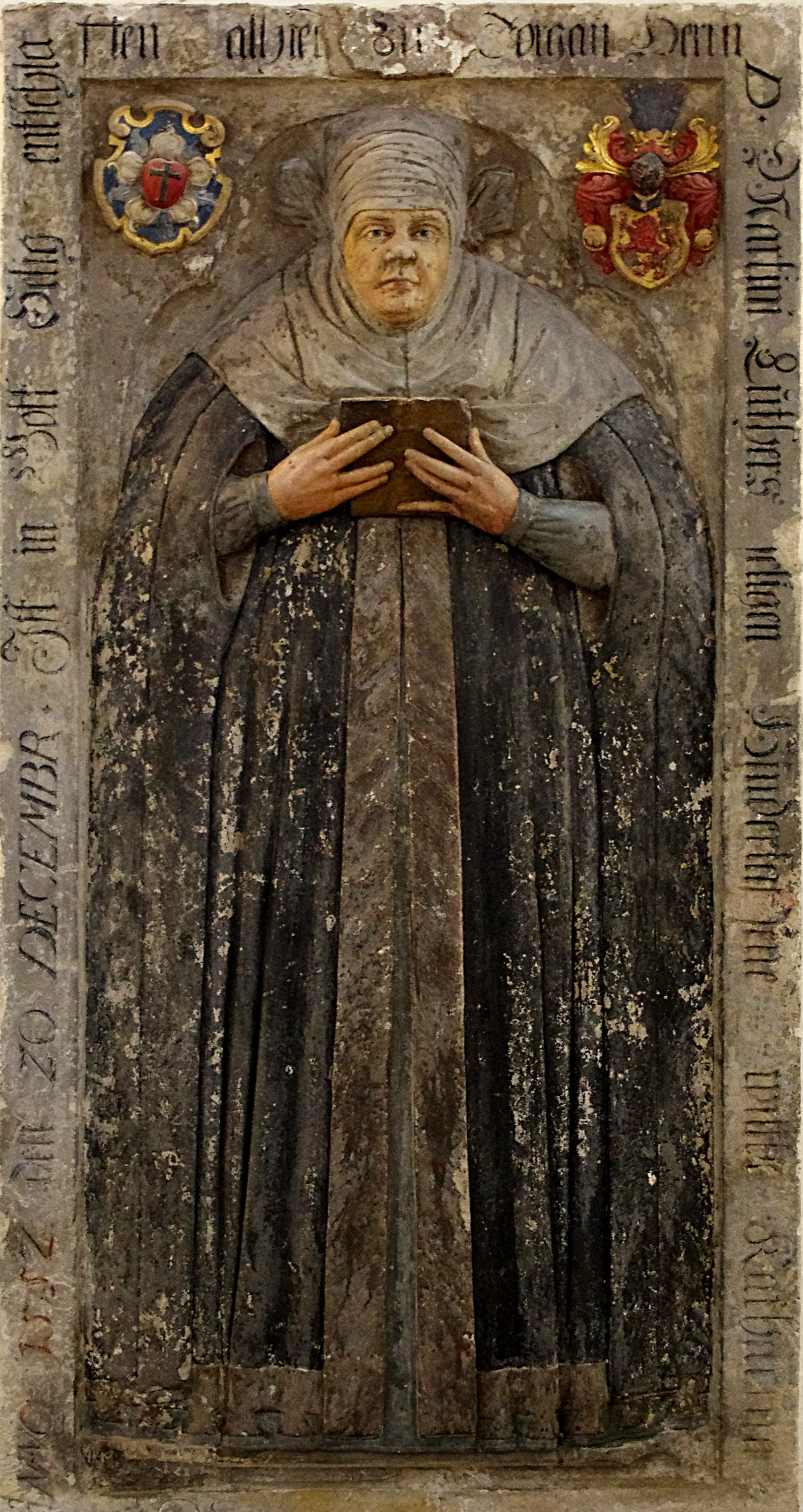 Torgau in Sachsen. In der Marienirche befindet sich das Grabmal der Katharina von Bora, der Ehefau von Martin Luther. Sie ist in Torgau gestorben.